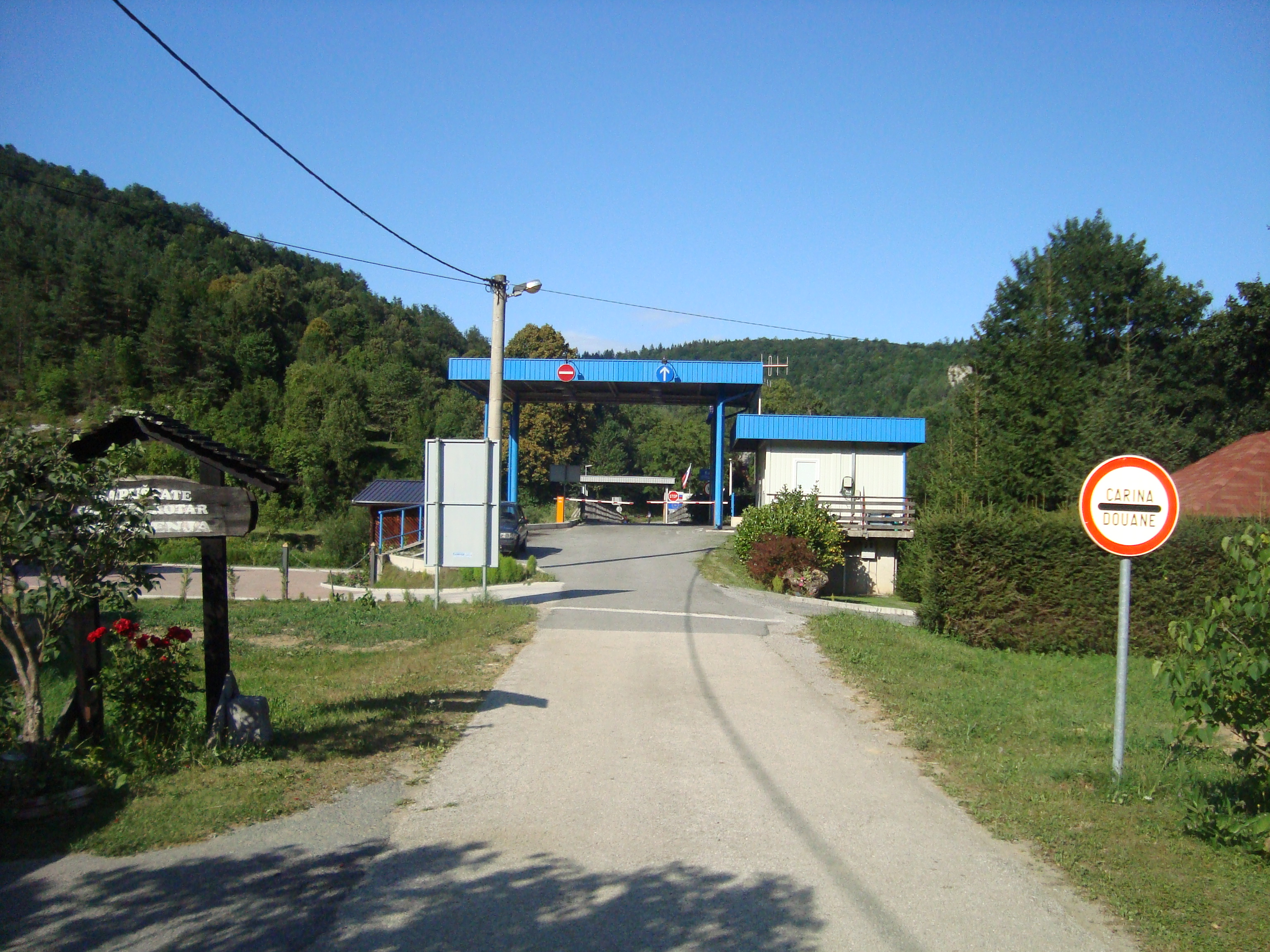 Granica sa slovenijom-Blaževci